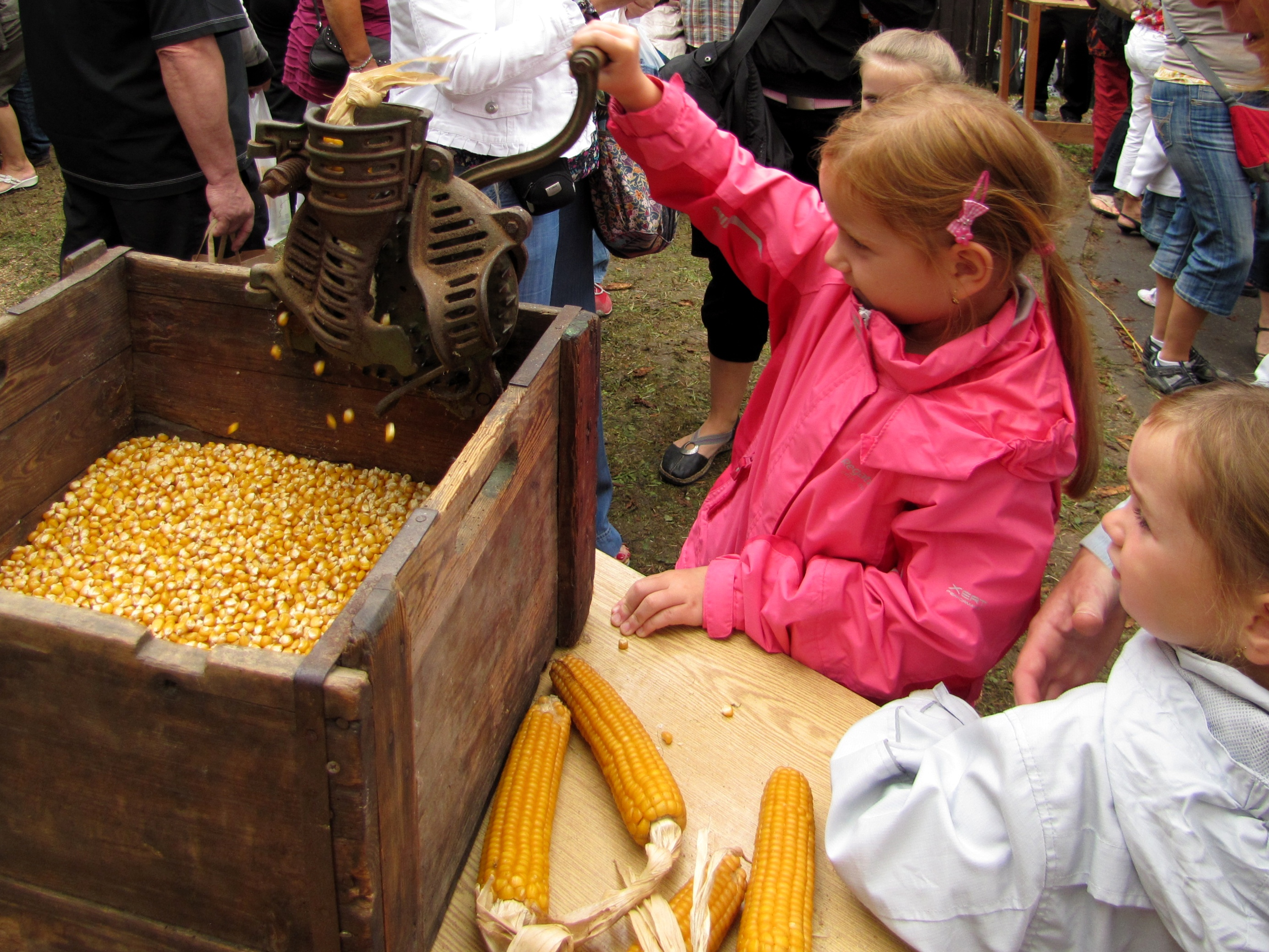 Jarmark na Slováckém roku 2011 v Kyjově